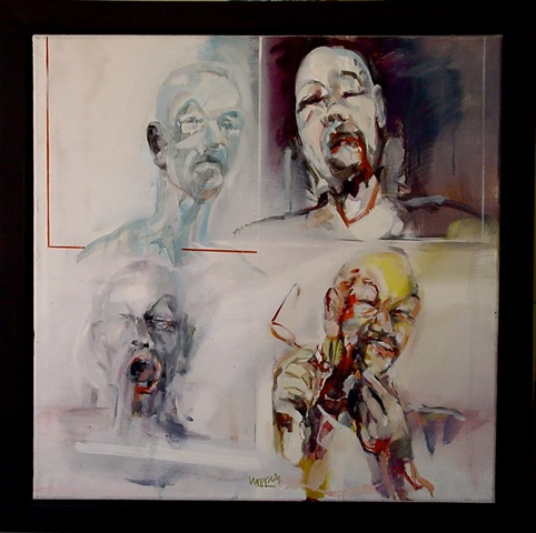 Peter Hoppe; Autoritratto Quatro (1986, Öl/Tempera auf Leinwand, 80x80 cm)